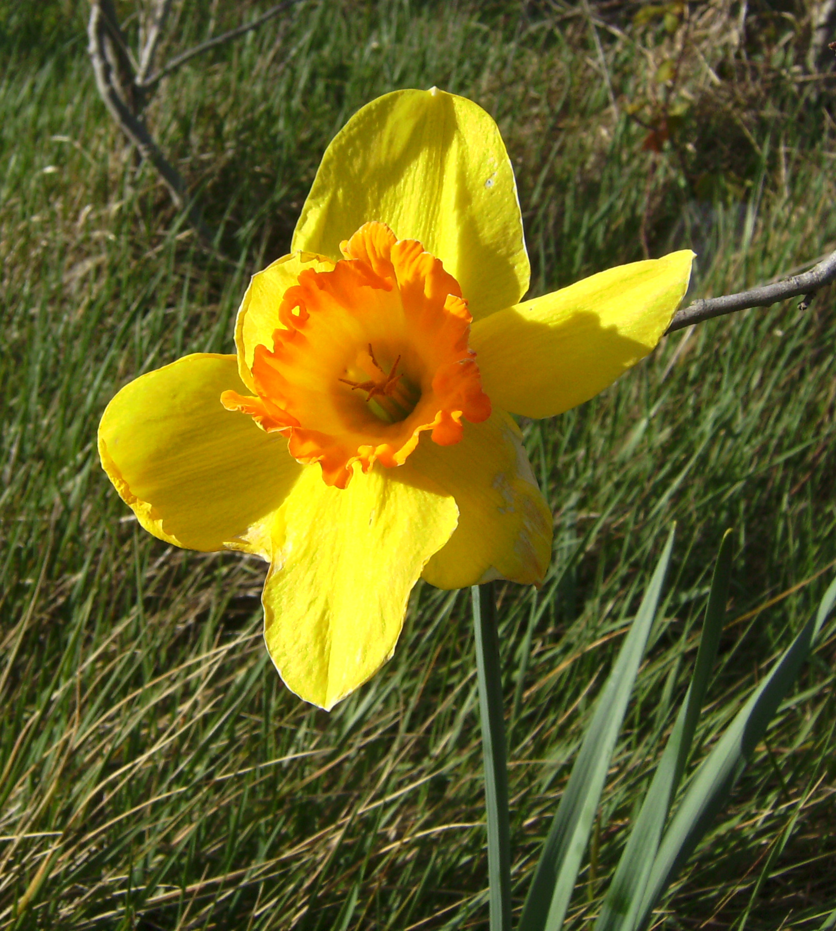 Narcís cultivar 'Carlton', Castelltallat, Bages